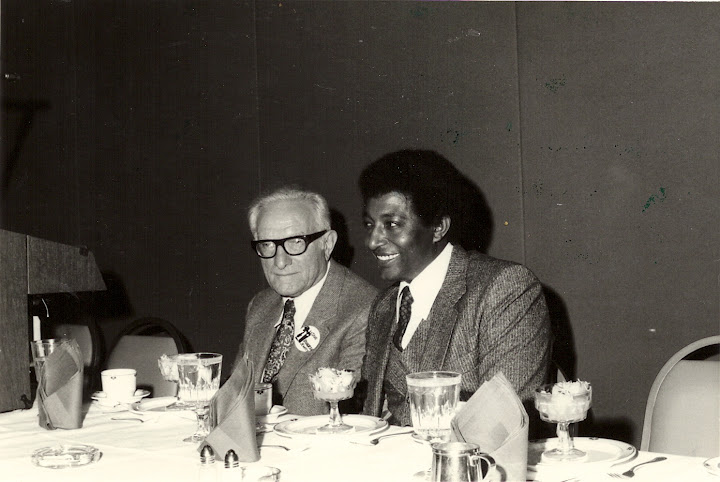 ברוך טגניה וגרנום ברגר בכינוס של האגודה האמריקאית למען יהודי אתיופיה (AAEJ), 31 אוקטובר 1983